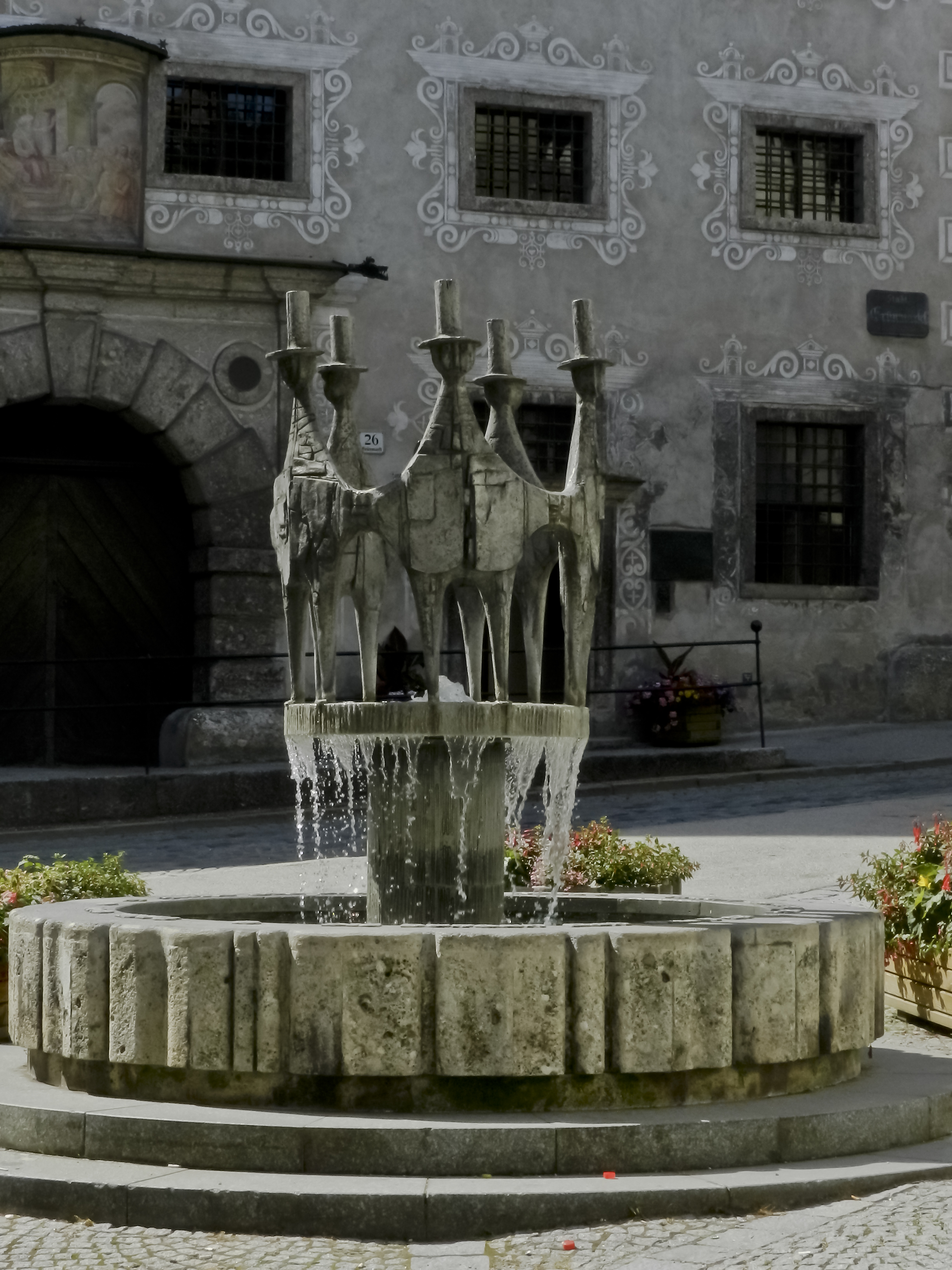 Der Bürgerbrunnen am Platz hinter dem Neutor. Er wurde in den Jahren 1977 bis 1979 nach einem Entwurf von Maximilian Stockenhuber gestaltet. Im Hintergrund befindet sich der sog. Innerberger Stadel, Stadtmuseum mit Schmiedegebäude. Grünmarkt 26, Steyr